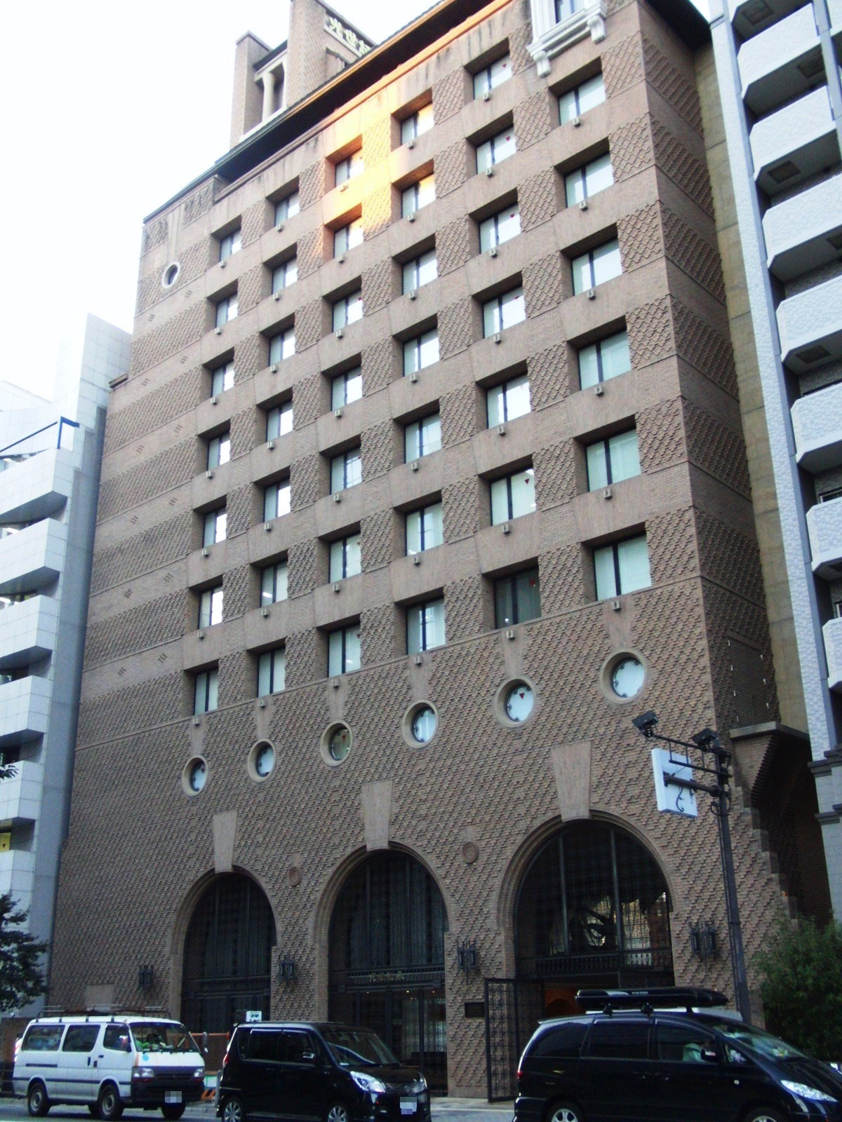 光世証券本社を撮影